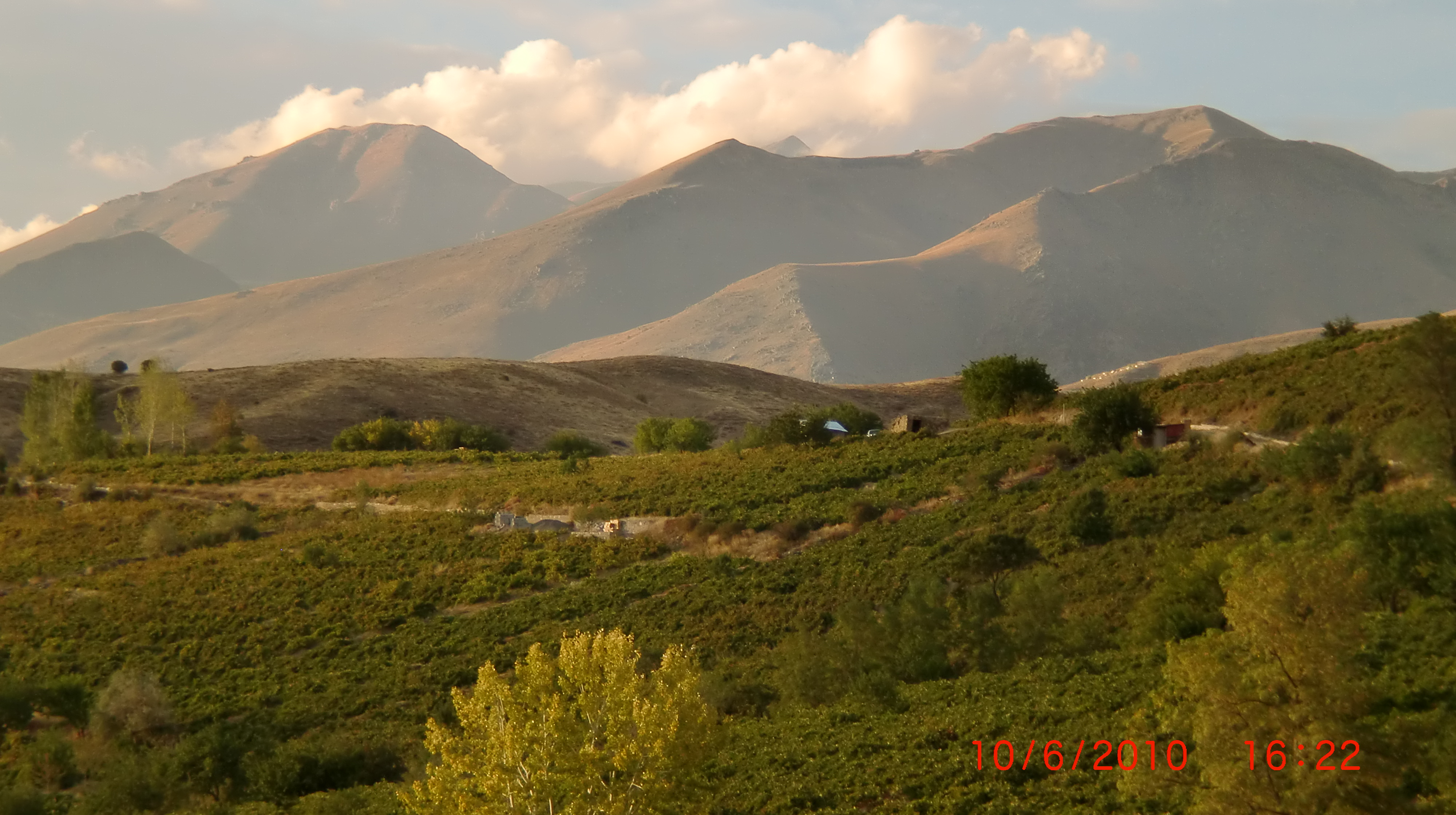 Üzüm baglari Erzincan (Göller köyü)